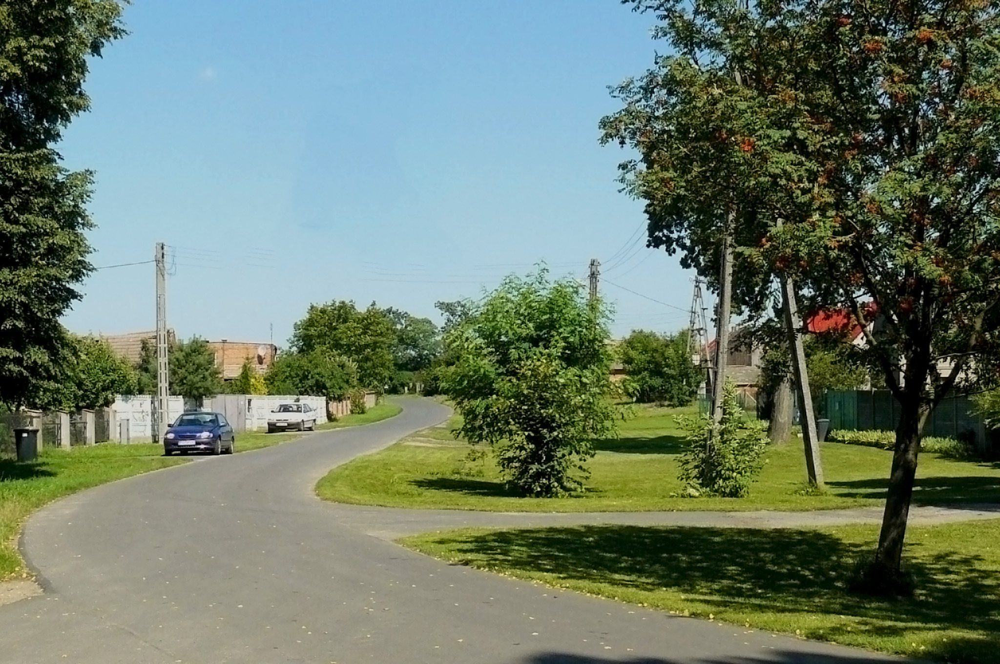 Drachowo